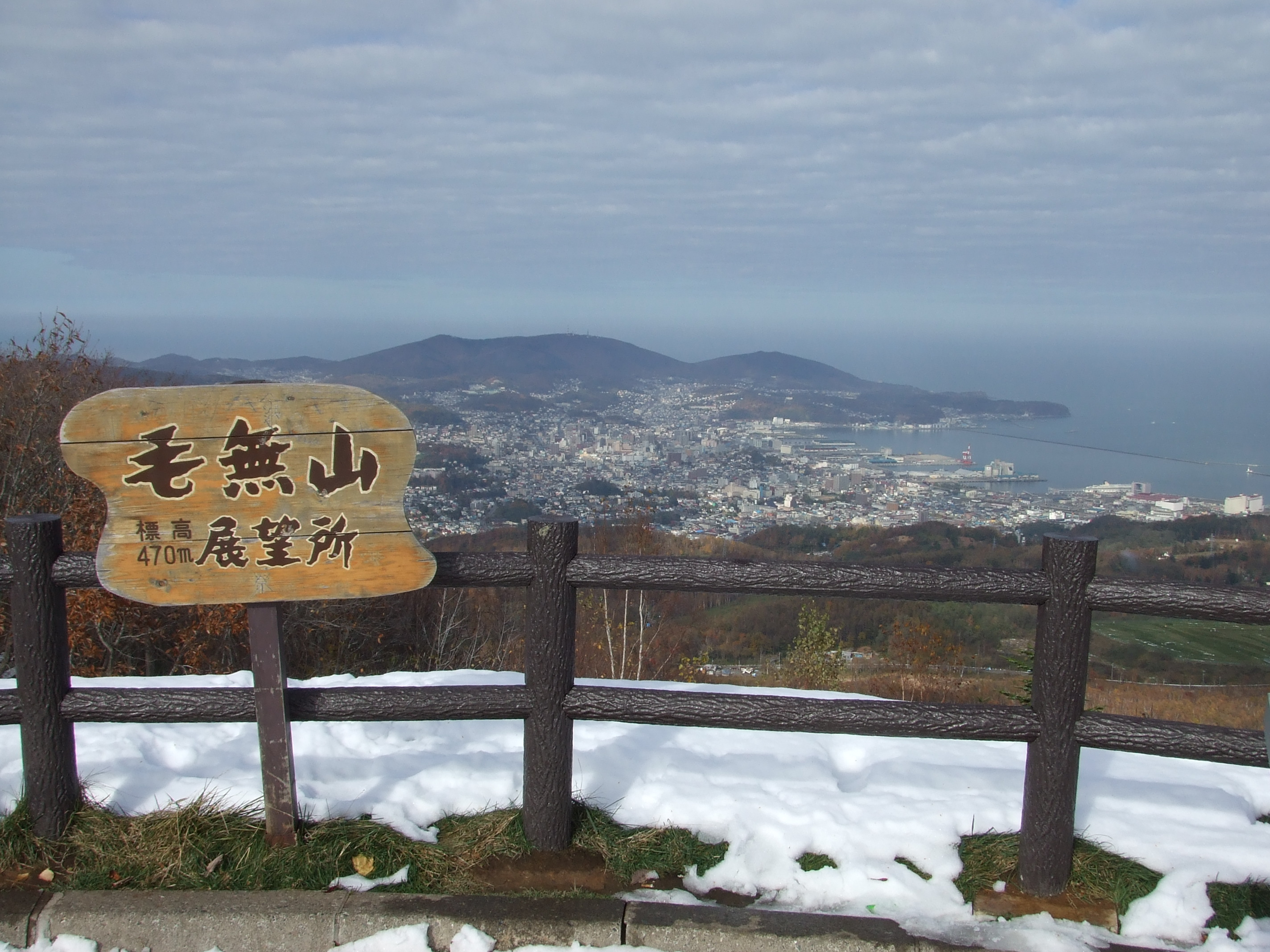 北海道小樽市毛無山展望所